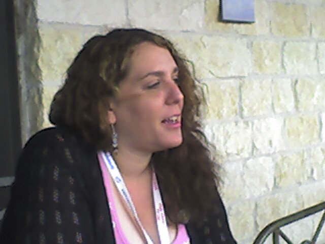 Molly Holzschlag